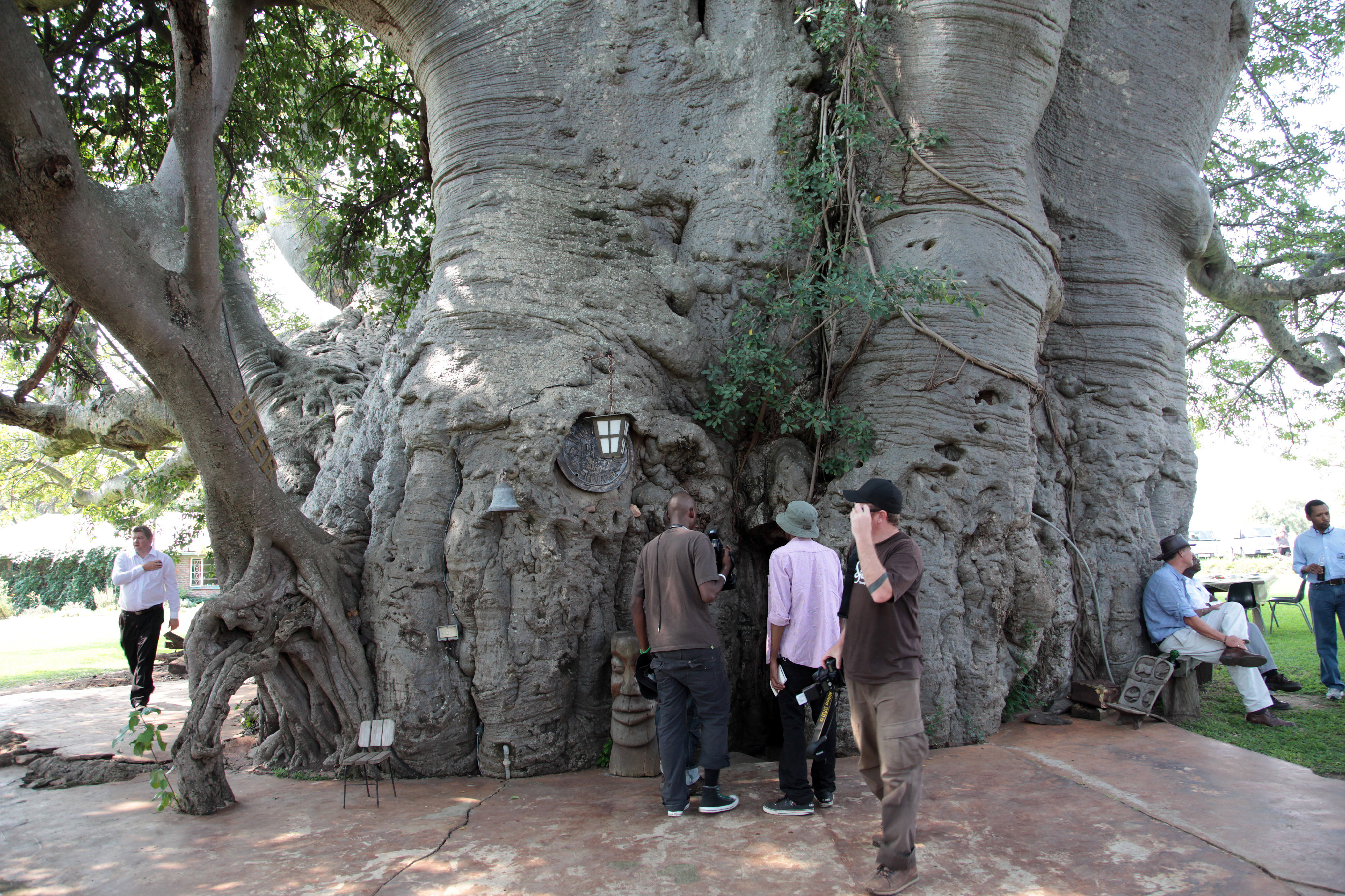 Vue du Limpopo en Afrique du Sud.